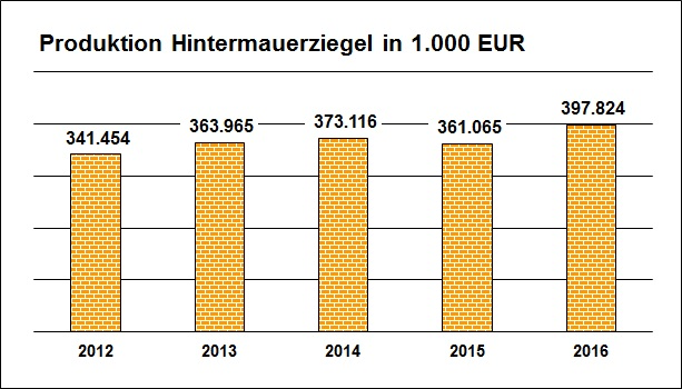 Produktionswert von Hintermauerziegeln in Tsd. Euro; Angaben gemäß Statistisches Bundesamt, Wiesbaden. Gegenüber dem Vorjahr stieg der Produktionswert von Hintermauerziegeln ohne Ergänzungsprodukte 2016 um über 10 Prozent an.